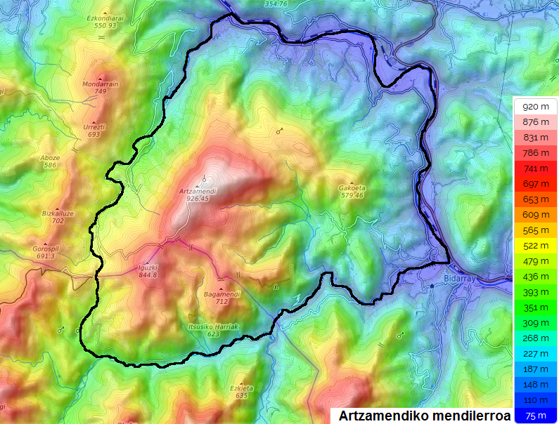 Artzamendiko mendilerroaren mapa topografikoa.